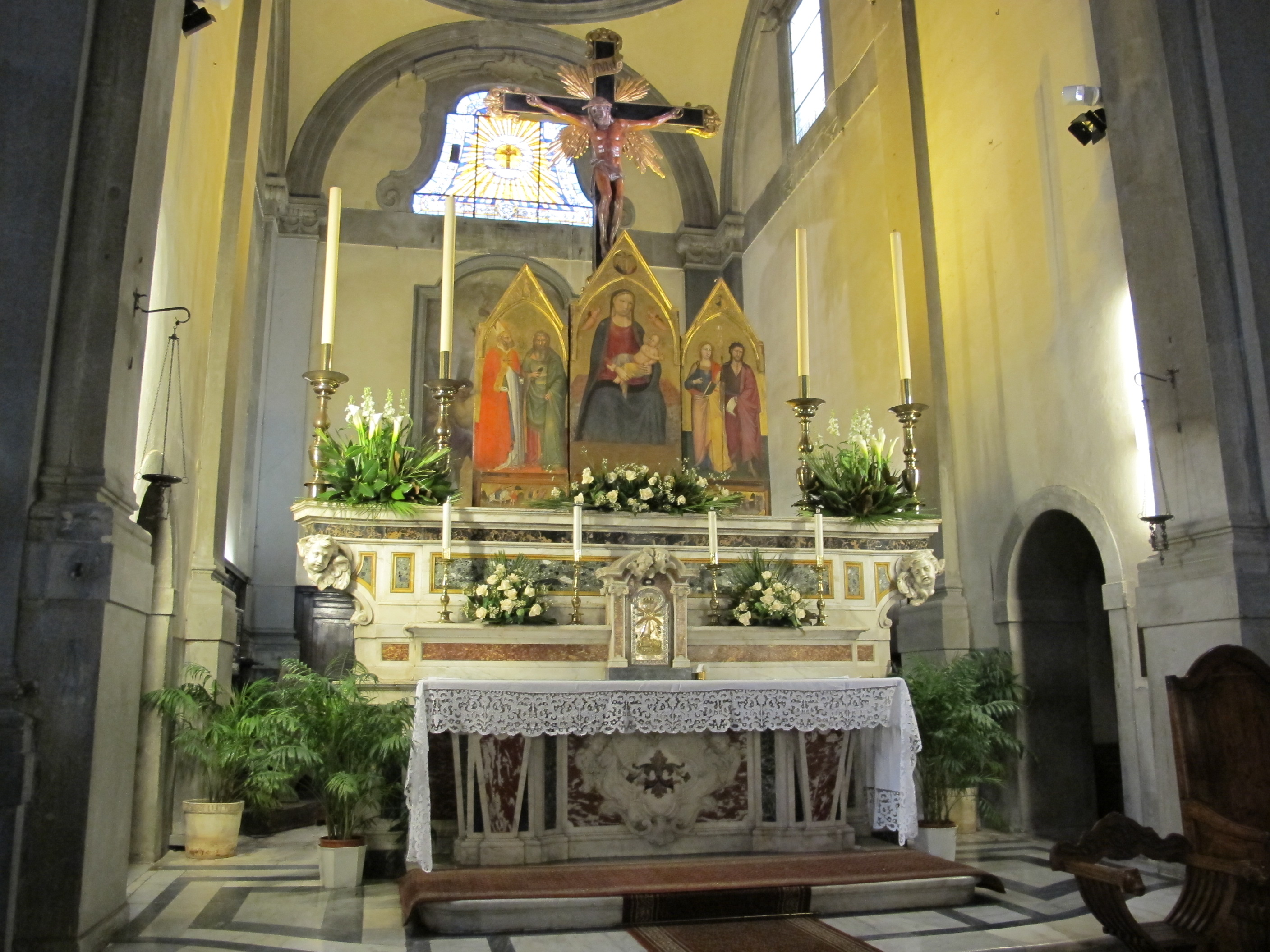 Empoli, collegiata, interno, altare maggiore